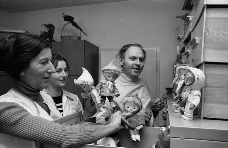 Berlin, Sandmännchen ADN-ZB/Senft/9.11.79/Berlin: Zum 20. Geburtstag des Sandmännchens/ Er wird am 22.11.79 zwanzig Jahre alt und bleibt doch ewig jung, der Liebling der Kinder, der allabendlich per Bildschirm den Gutenachtgruß bringt. Jung bleiben auch die Mitarbeiter im Trickfilmstudio des Fernsehens der DDR, weil ihnen die Arbeit mit dem lustigen kleinen Gesellen und seinen Freunden Spaß macht. Dort sind u. a. der "Vater" des Sandmännchens, Gerhard Behrendt (r.), Werkstattleiterin Diethild Dräger (l.) und Puppengestalterin Gabriele Baier tätig. Und wer nur ahnte, daß es verschiedene Sandmännchen gibt, der hat nun den Beweis. In den Schubfächern der Puppenwerkstatt sind Sandmännchenpuppen für unterschiedliche Rollen "archiviert". Abgebildete Personen: Behrend, Gerhard: Künstlerischer Leiter der Puppentrickfilmstudios beim Fernsehen, DDR